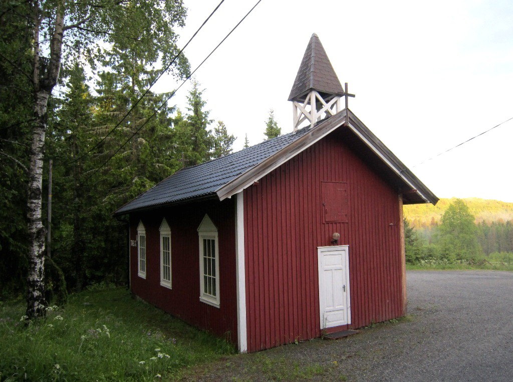 Tabor kapell, Nedre Eiker